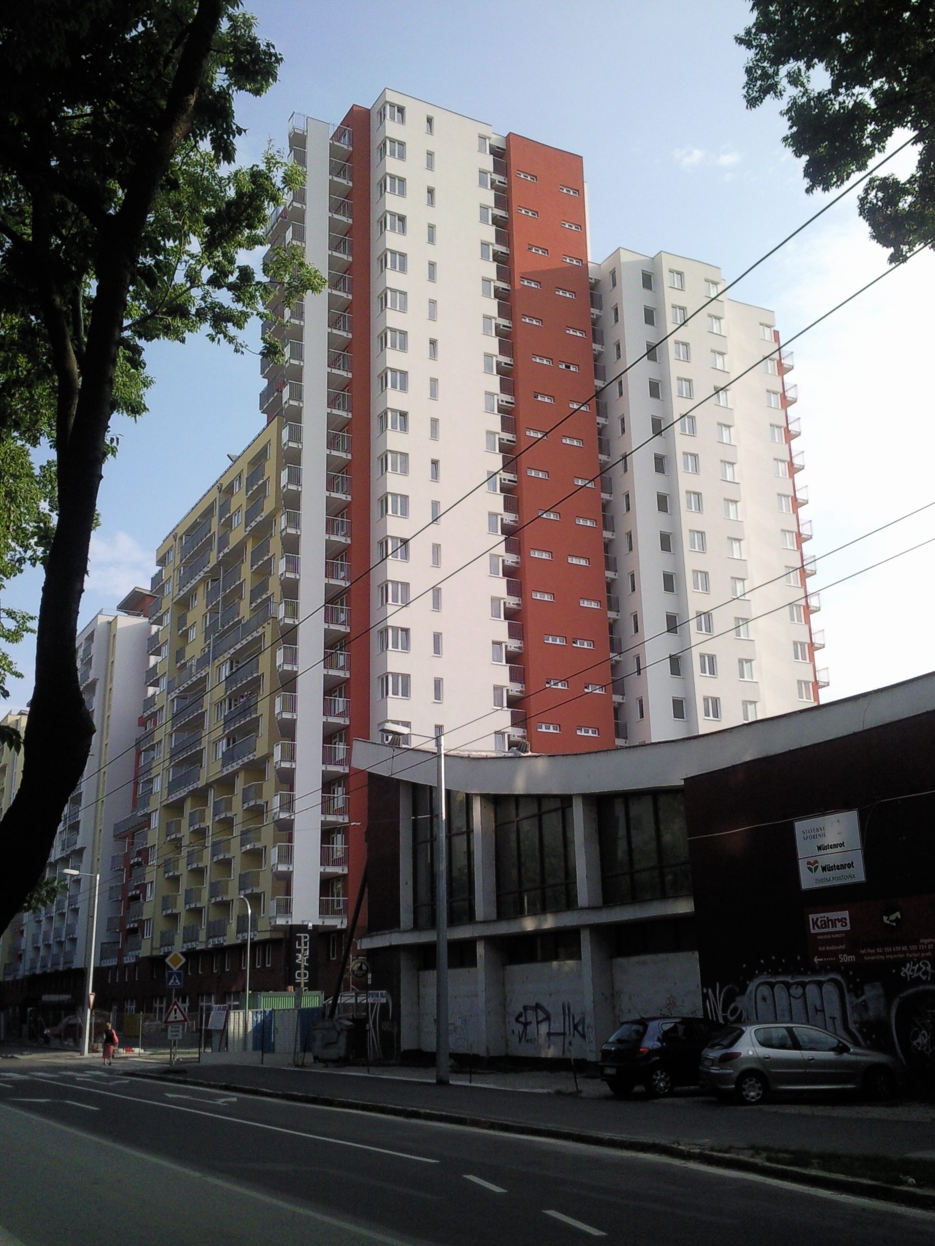 Jégého alej, Bratislava